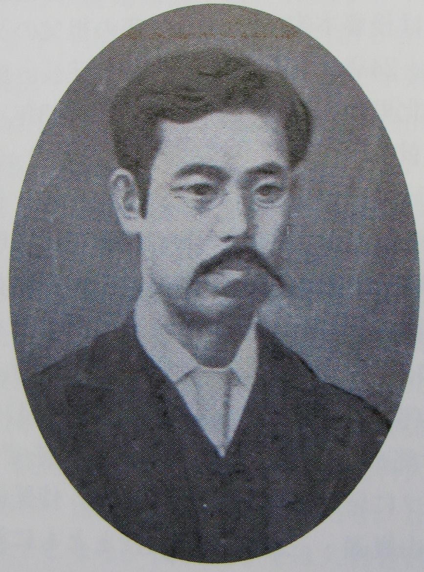 Photograph for Dr.kichinndo,inoko 許可